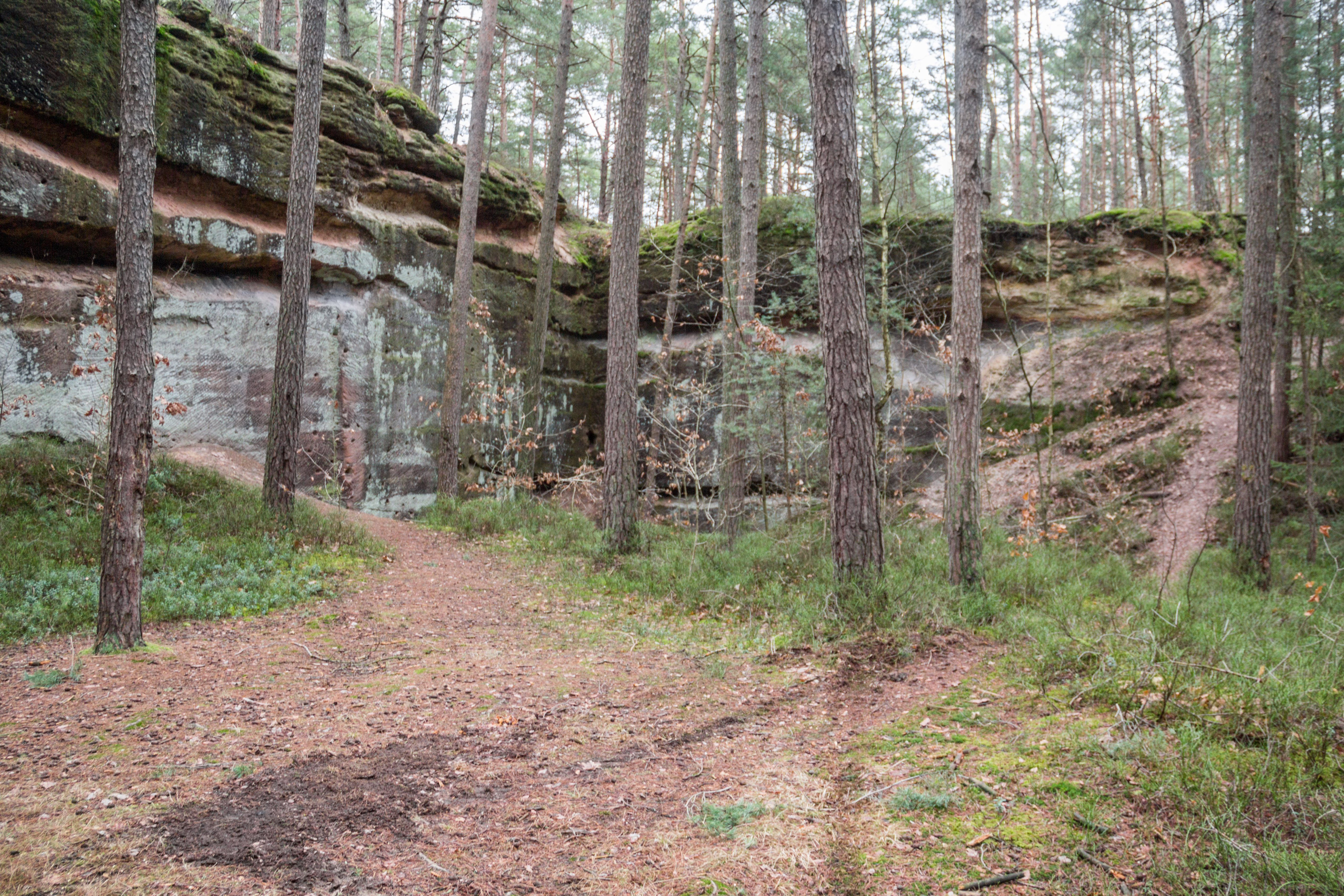 Steinbruch, aufgelassen, Kühedorf, Geotop, Landschaftsschutzgebiet